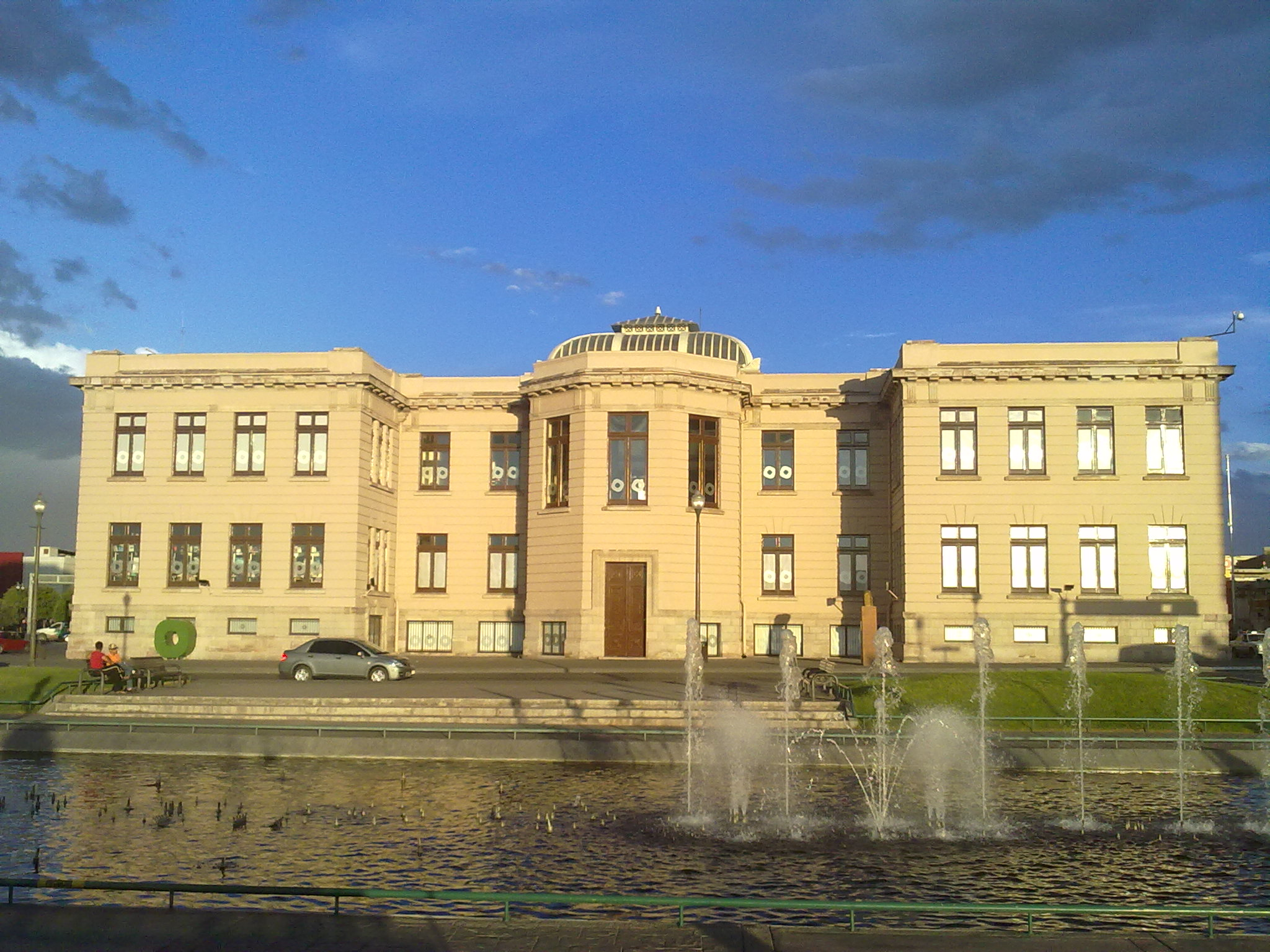 fotografia de museo casa chihuahua.